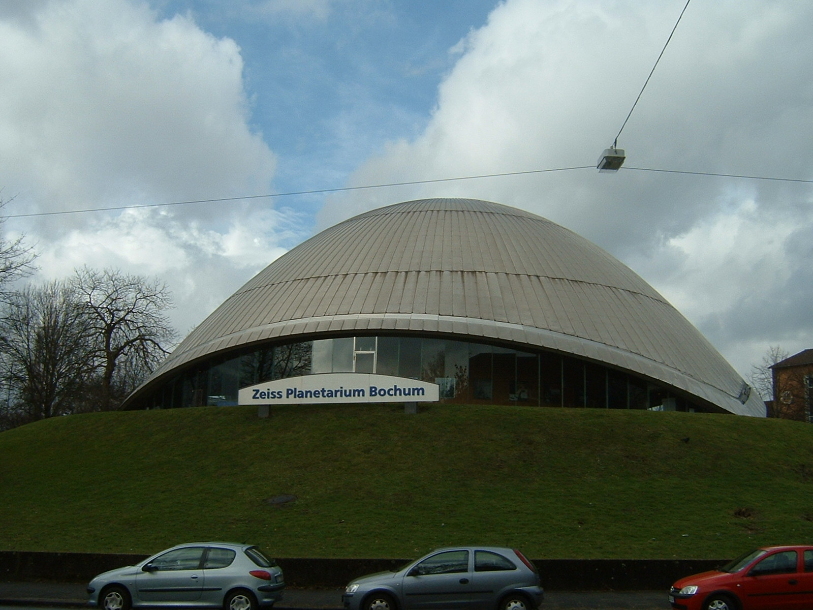 Planetarium Bochum